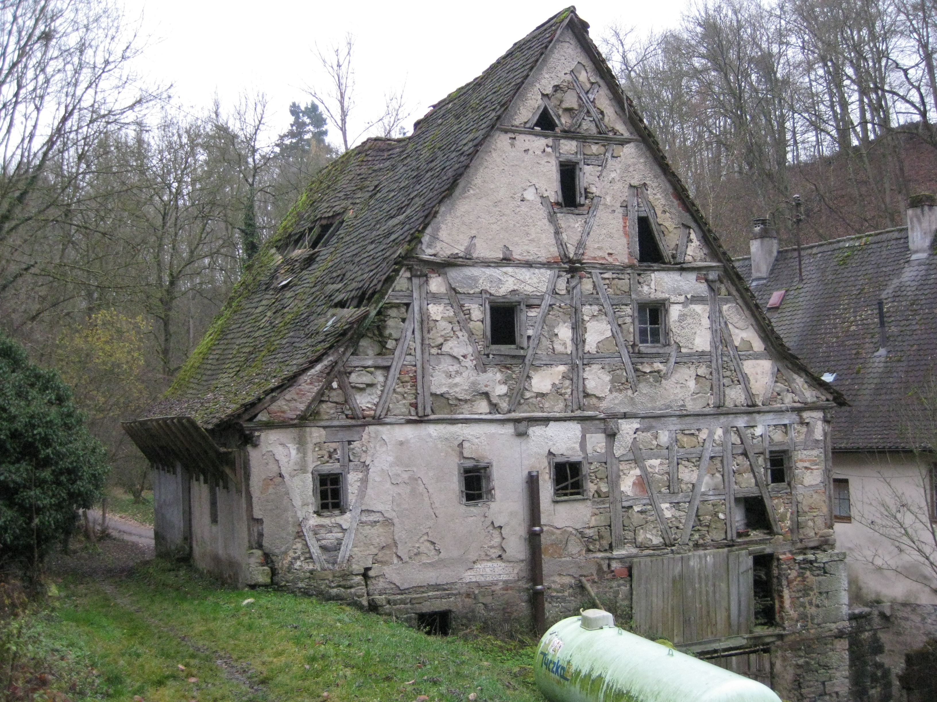 Alter Teil der Oberen Walkmühle bei Rothenburg ob der Tauber der im August 2010 eingestürzt ist und später abgerissen wurde.